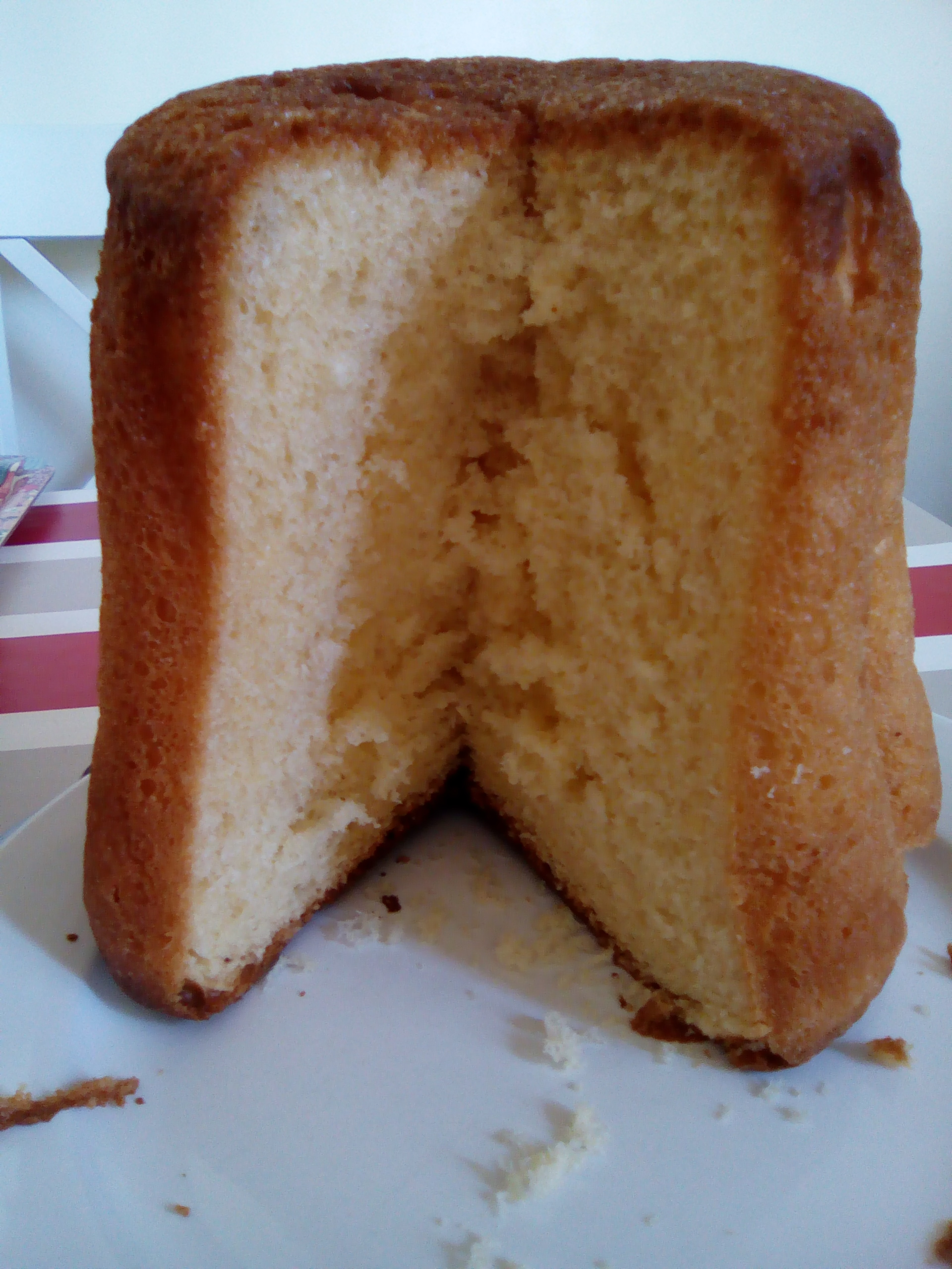 Gâteau battu entamé